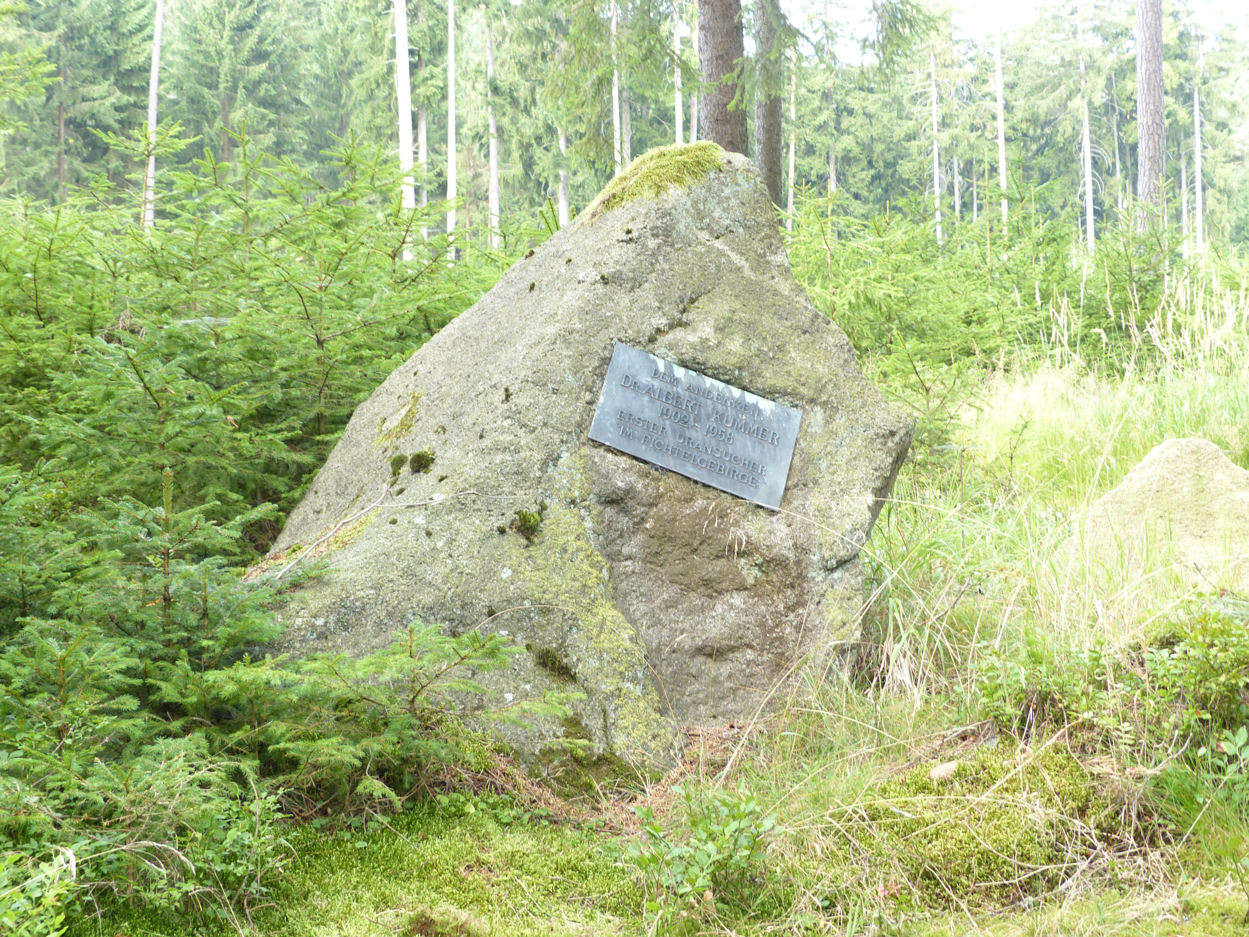 Außengelände Uranbergwerk Weißenstadt